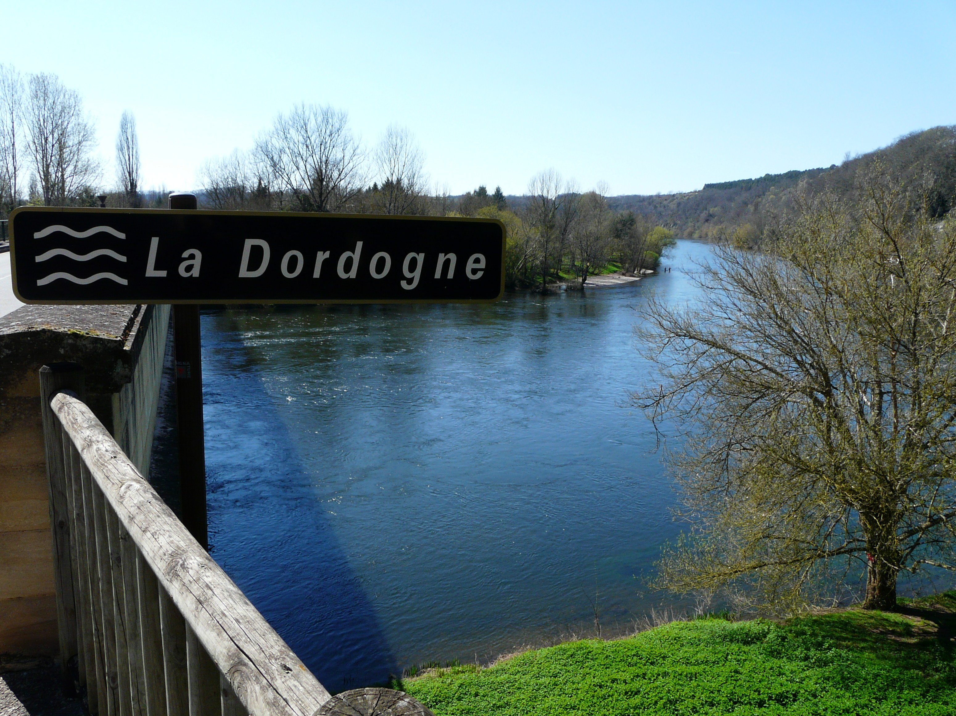 La Dordogne à Limeuil, Dordogne, France. En rive opposée, la commune d'Alles-sur-Dordogne.